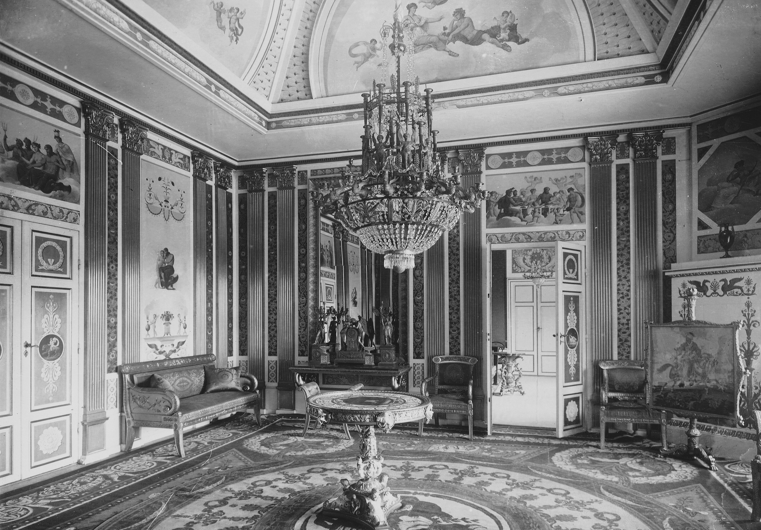 Rosendals slott, Kupolsalongen